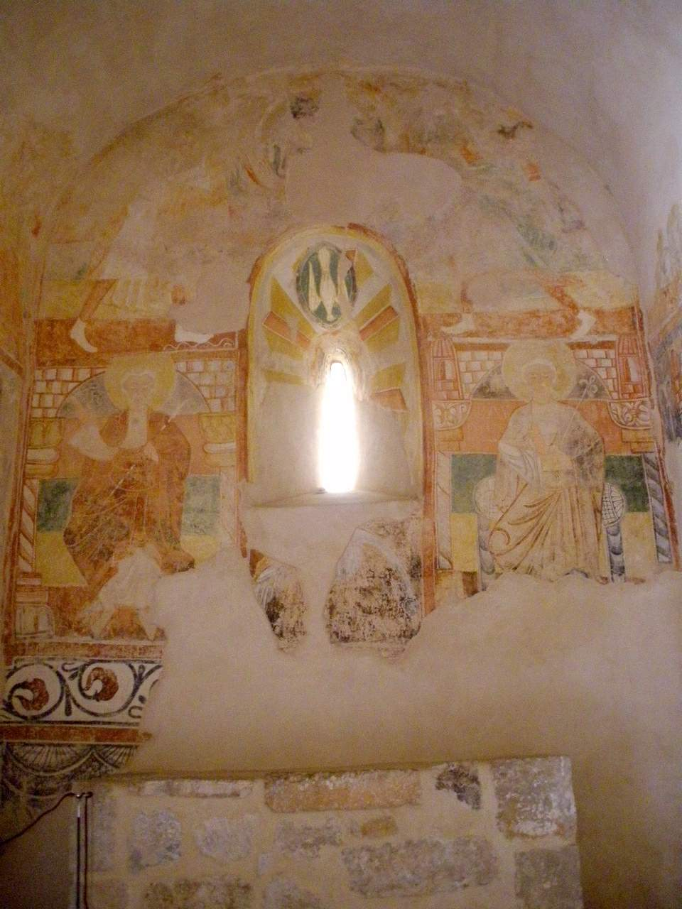 Ermita mozárabe de San Baudelio de Berlanga (Soria)